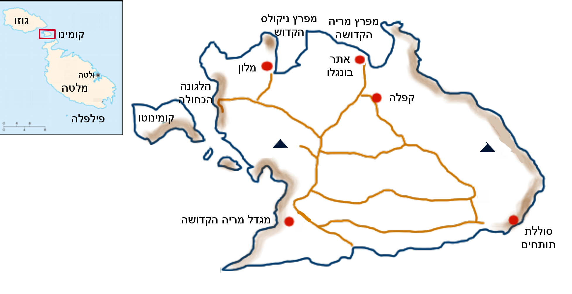 קומינו